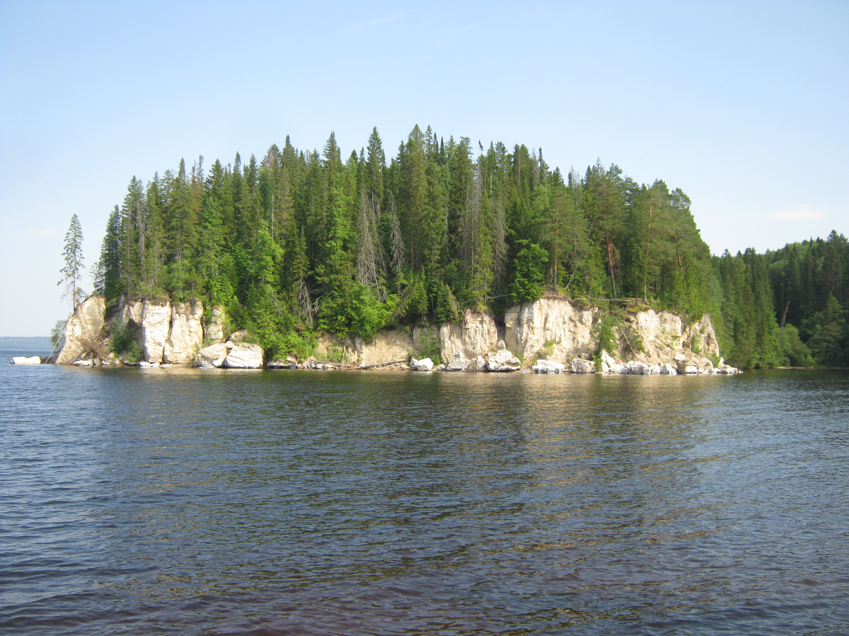 Хохловка